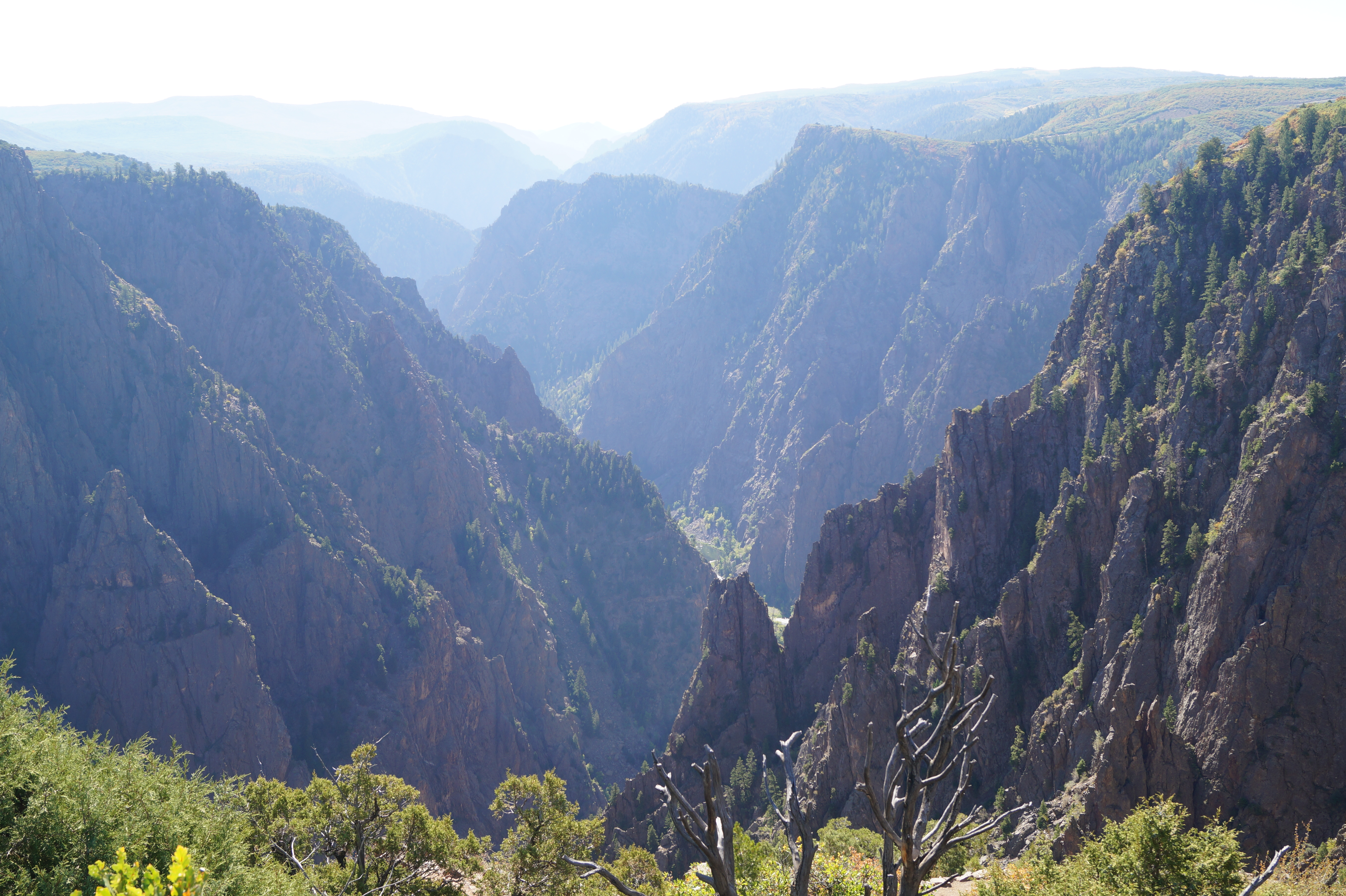 Blick in den Black Canyon of the Gunnison im Westen Colorados.